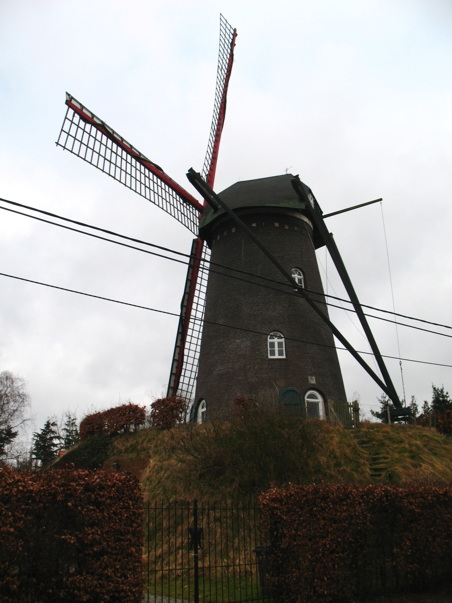 Salm-Salm Molen te Hoogstraten, provincie Antwerpen